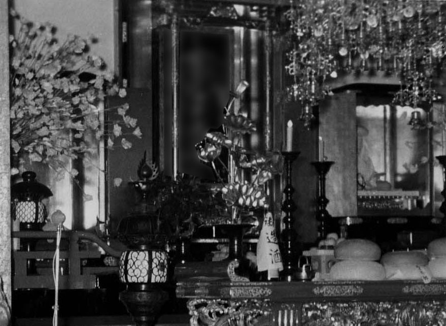 昭和32年に改築された常在寺の旧御宝前